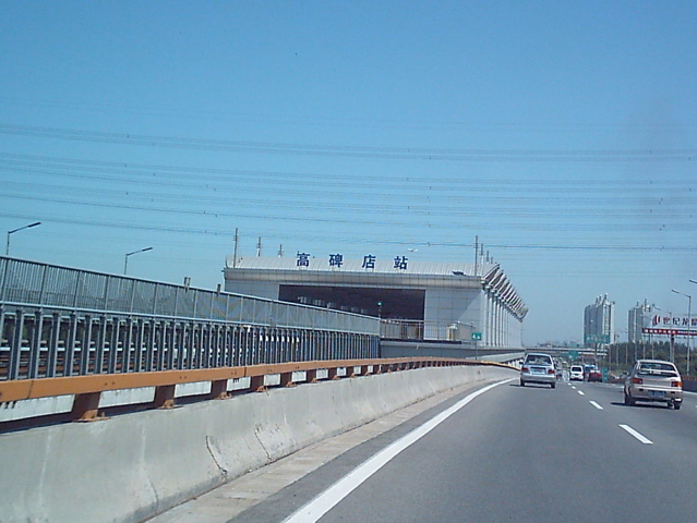 Beijing Underground, Gaobeidian Line Batong station